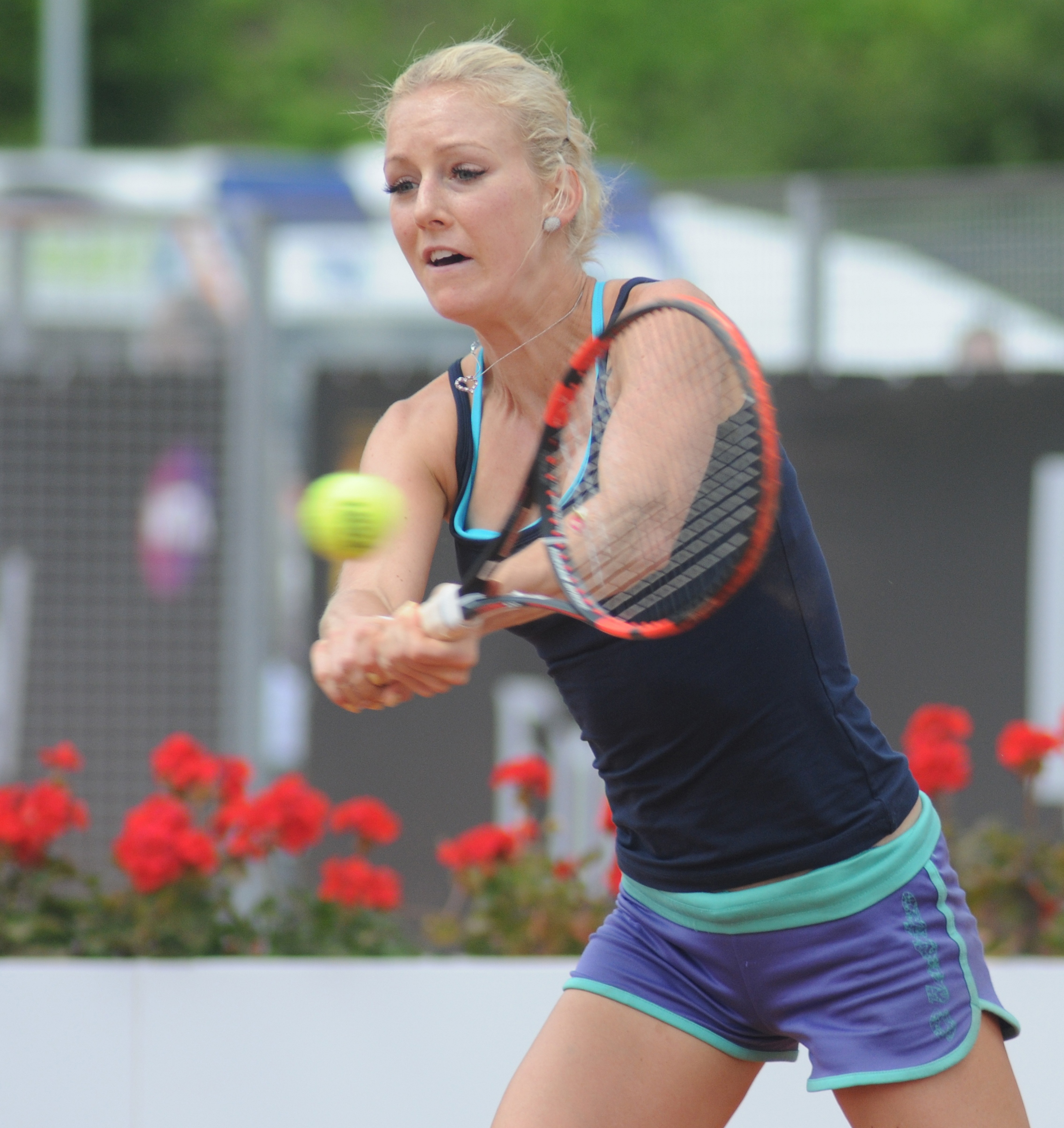 Urszula Radwańska at the 2014 Internazionali BNL d'Italia